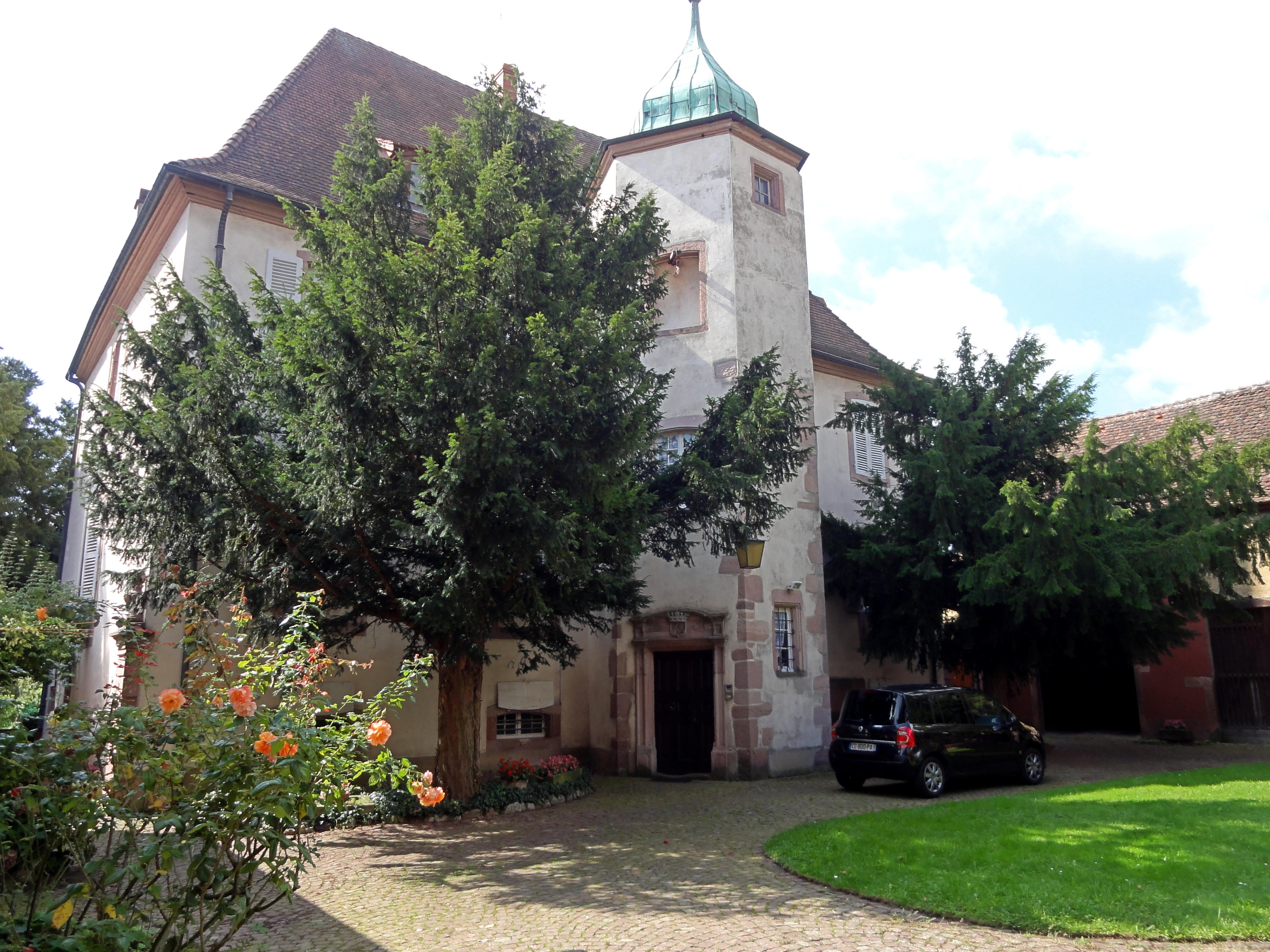 Alsace, Haut-Rhin, Kientzheim, Ancien château des Ifs (XVIe), 6 rue Philippe-Aimé de Golbéry, Vue d'ensemble côté cour avec tourelle d'escalier. It is indexed in the Base Mérimée, a database of architectural heritage maintained by the French Ministry of Culture, under the references PA68000023 and IA68004087 .